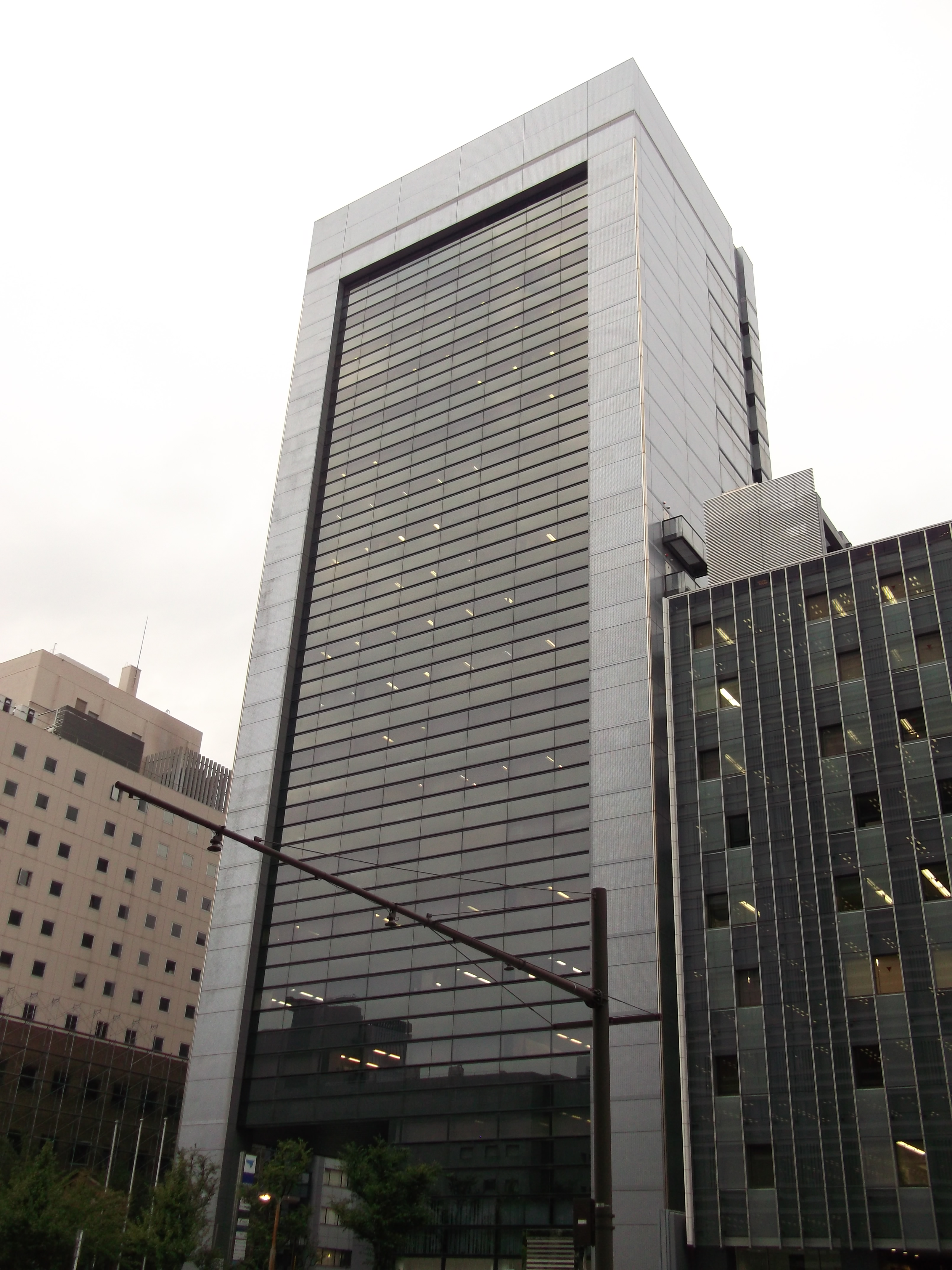 名古屋市中区の丸の内KSビルを南側公道東より撮影